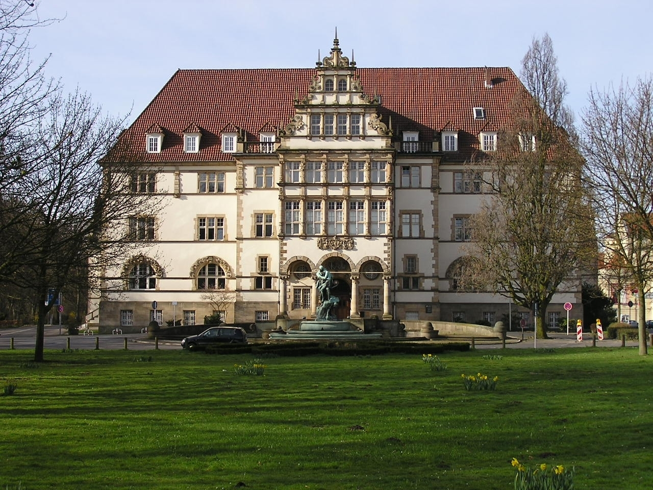 Altes Regierungsgebäude (eigtl. Neue Regierung) des Präsidiums des ehemaligen Regierungsbezirks Minden in Minden, Nordrhein-Westfalen mit einem prachtvollen Giebel im Stil der Weserrenaissance. Der Architekt war Paul Kirschke. Das Gebäude befindet sich auf dem ehemaligen Weserglacis am linken Weserufer und diente nach Verlegung der Regierung nach Detmold als Sitz des Bundesbahn-Zentralamt (BZA). Der Architekt war Paul Kieschke.